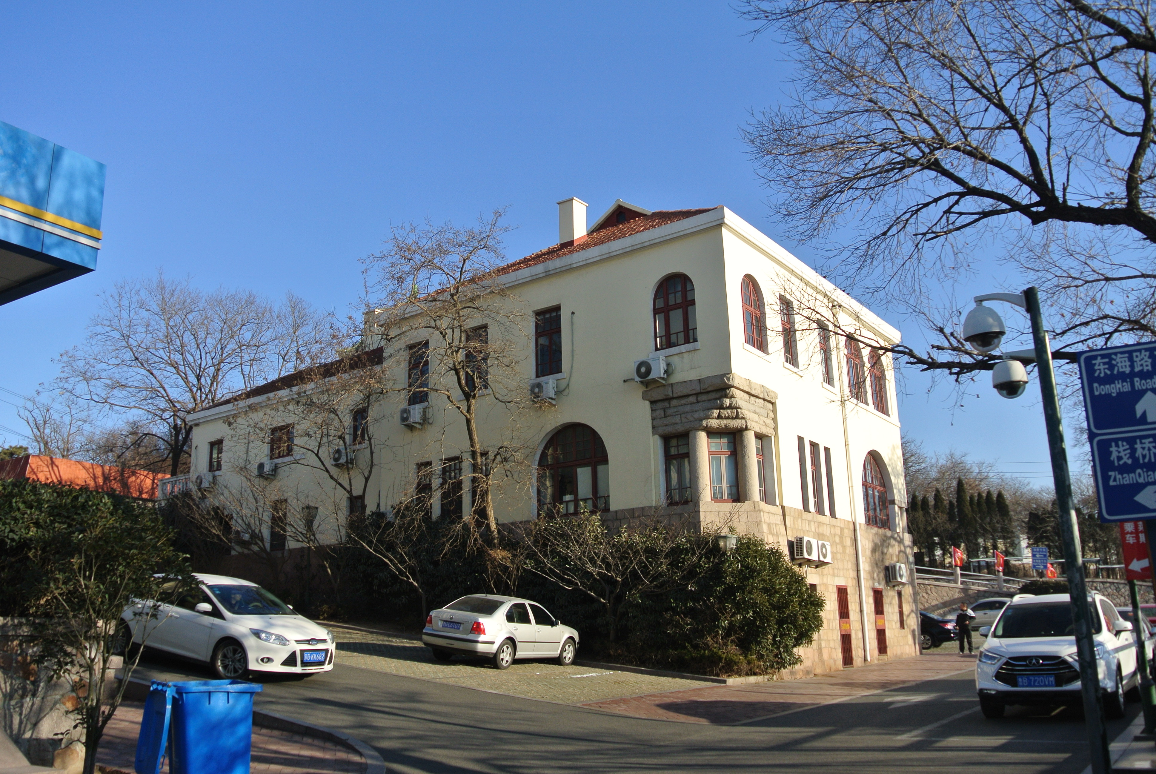 胶海关副税务司艾瑞时住宅旧址